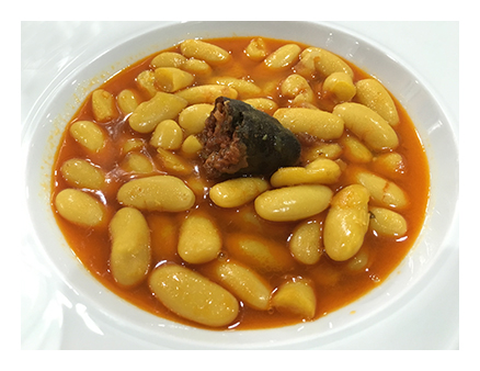 plato de fabada Asturiana